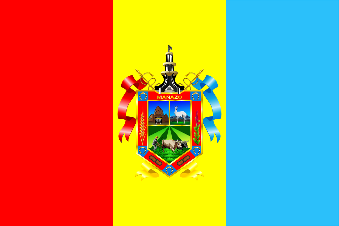 Distrito de Mañazo - Provincia de Puno - Región Puno